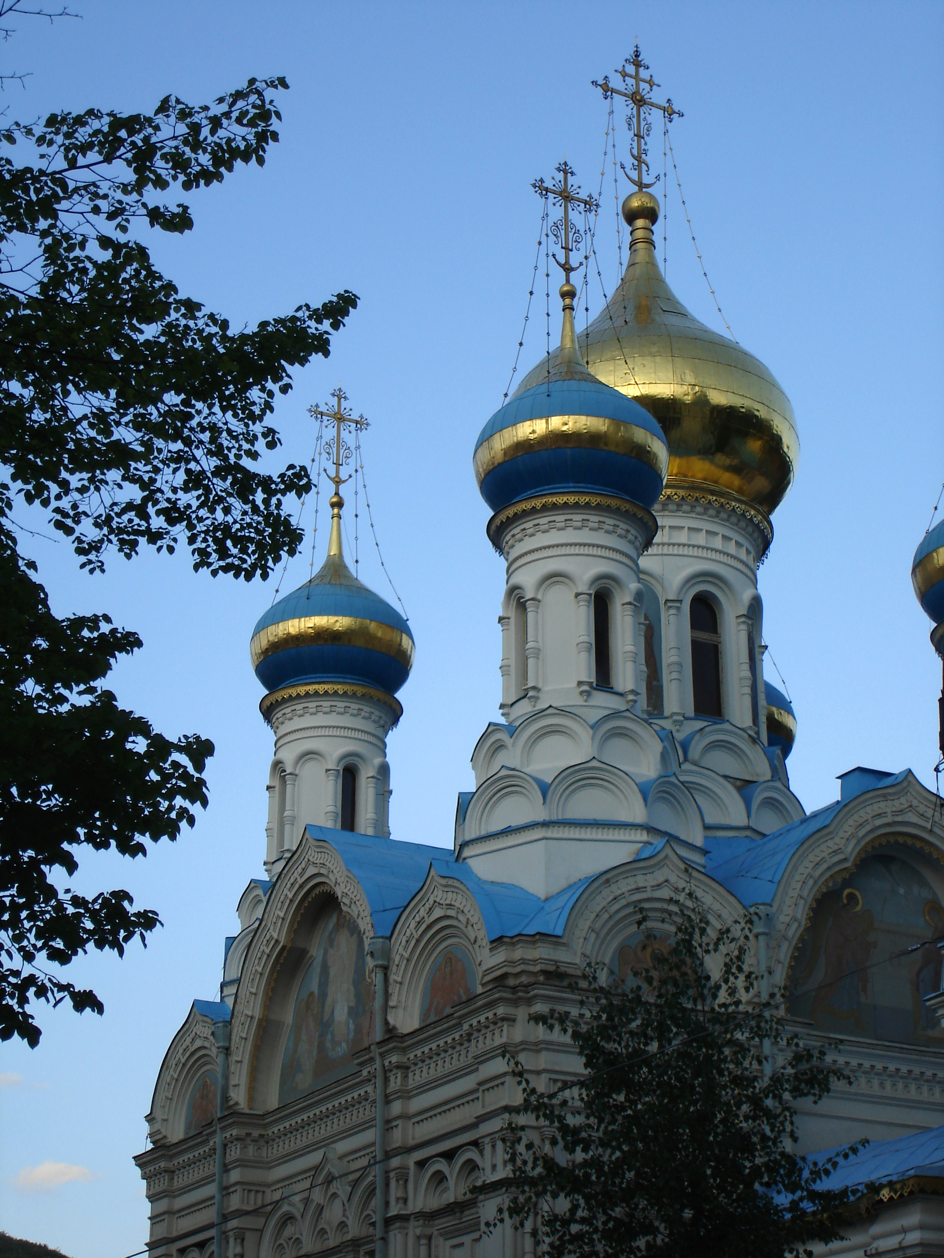 peter paul church, karlovy vary